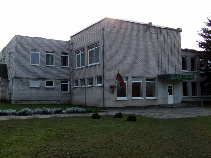 Labūnava school, Kėdainiai district, Lithuania.